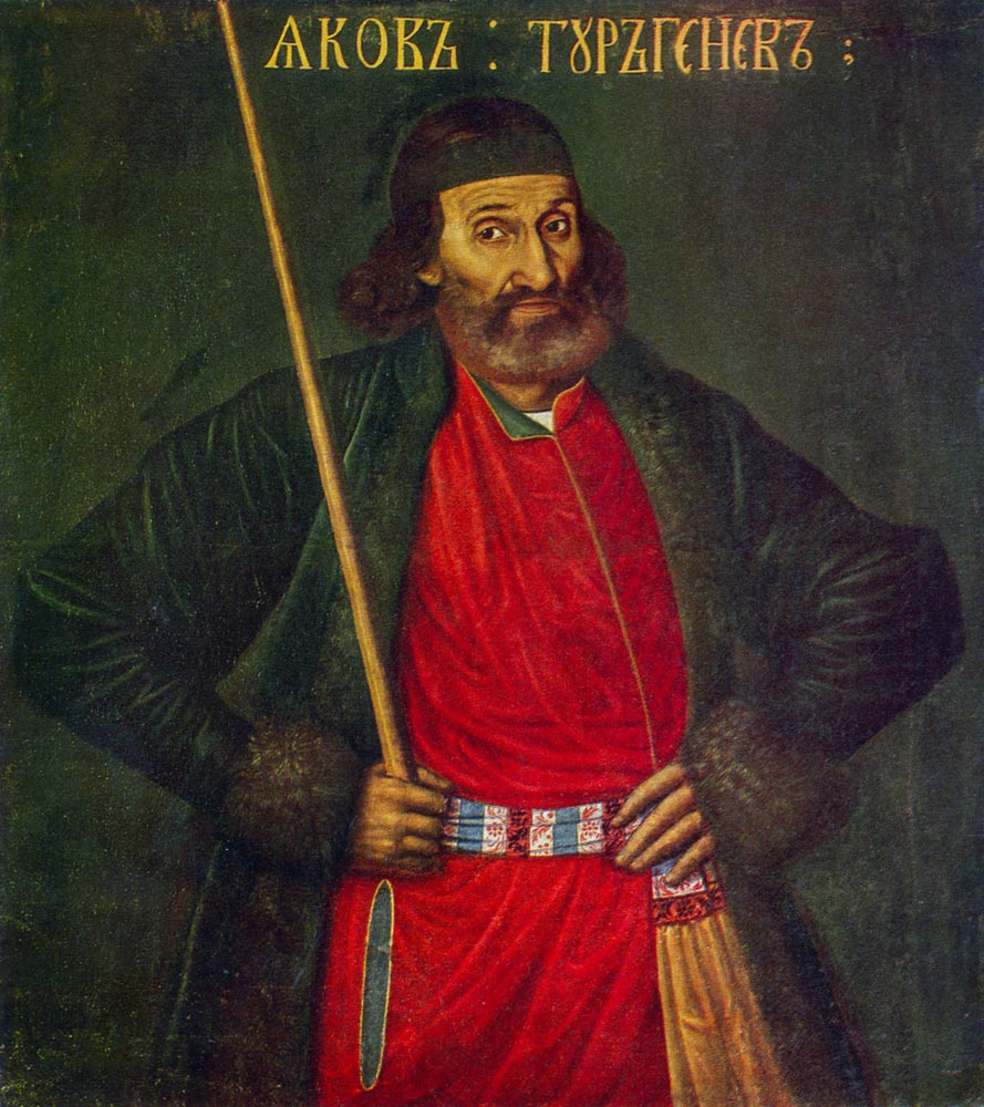 Неизвестный художник конца 17 века. Портрет Якова Федоровича Тургенева. Не позднее 1695. ГРМ Исполнение портрета следует отнести к последним голам жизни Тургенева. Плоскостность изображения, локальность цвета, резкие контуры говорят о традициях, связывающих его с приемами древнерусской живописи. Однако в основе художественного видения мастера уже преобладают натурные наблюдения. Они сказываются в искусной передаче материала и деталей одежды, но более всего — в экспрессии лица и позы портретируемого.